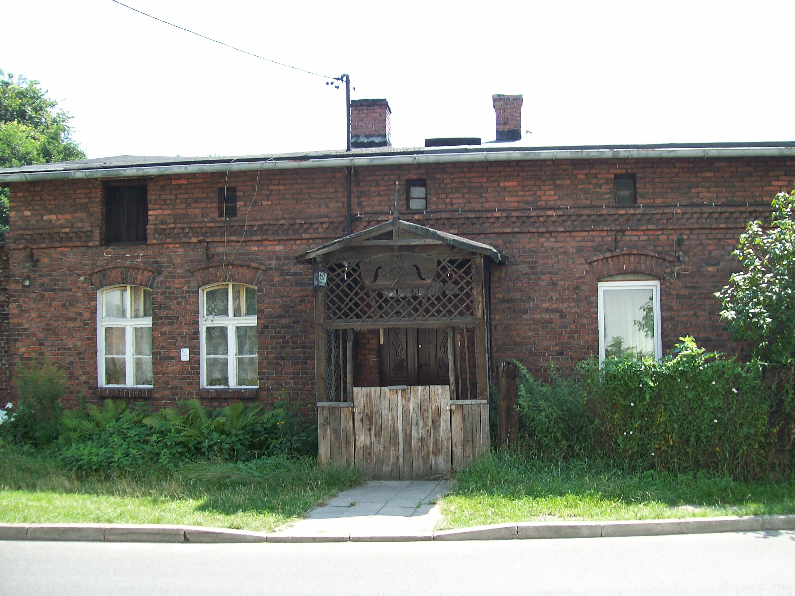 Dom z pocz. XX wieku z herbem górniczym nad wejściem, Katowice Piotrowice ul. Wojska Polskiego